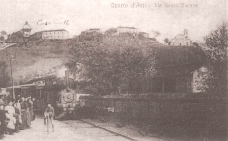 Quarto d'Asti, stazione tram